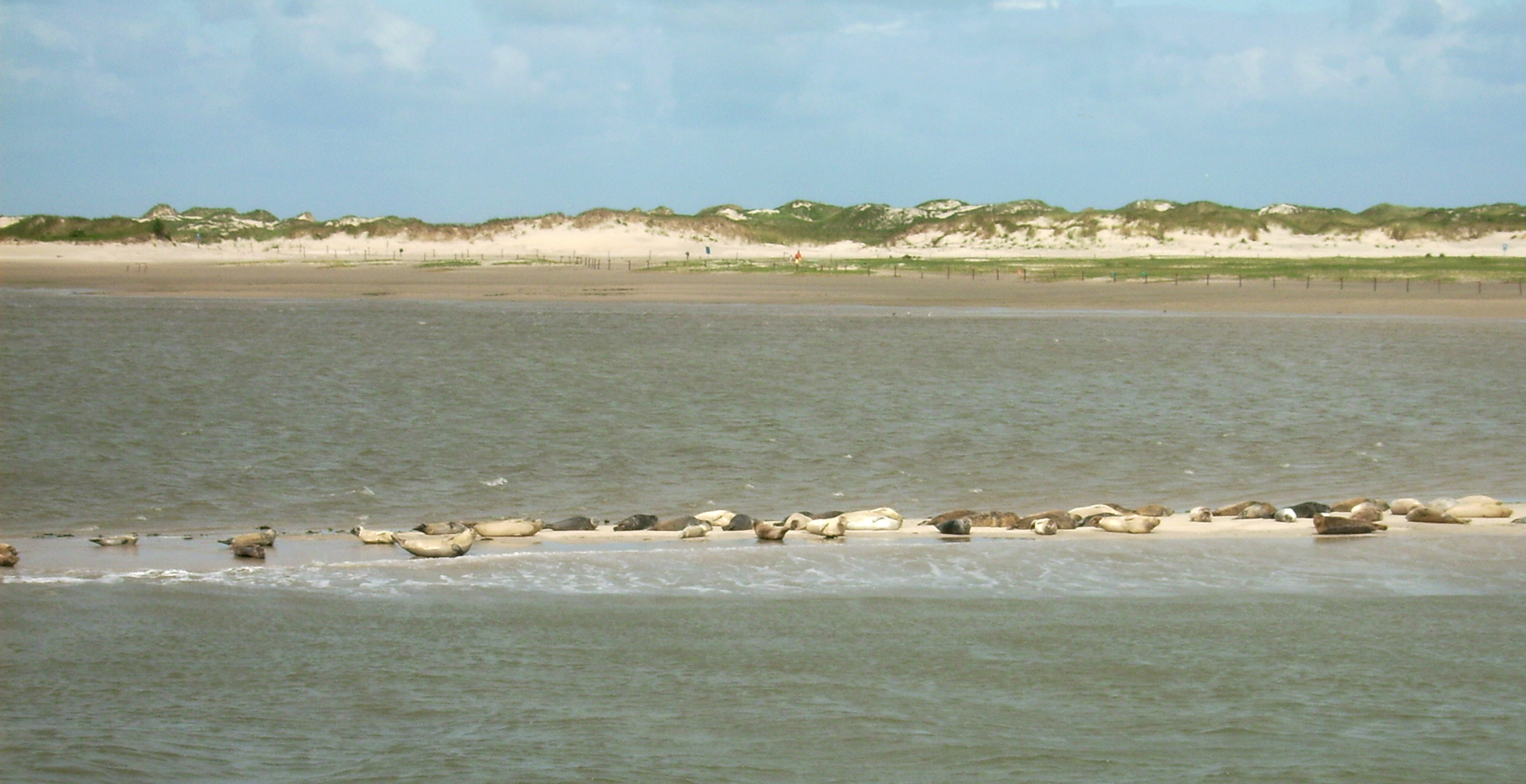 Robben am Ostende der Insel Norderney